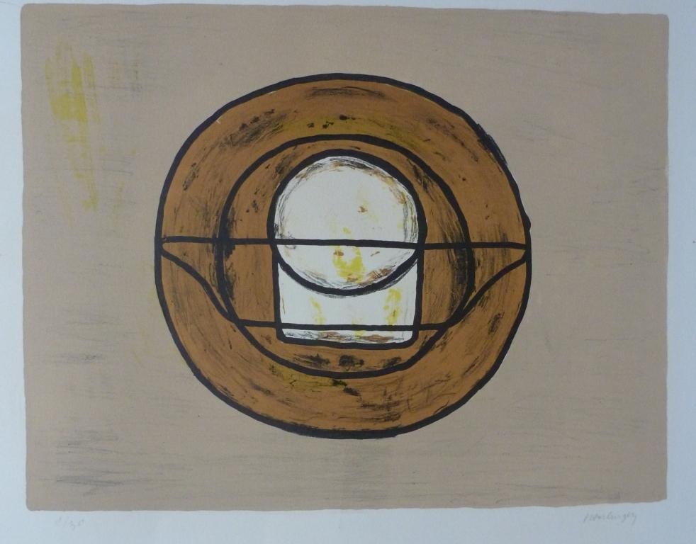 L'artiste réalise dessins, gouaches, lithographies en préalable ou en parallèle à ses recherches picturales sur les hiéroglyphes..